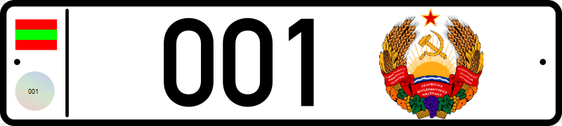 Автомобильный номер высшего руководства Приднестровья